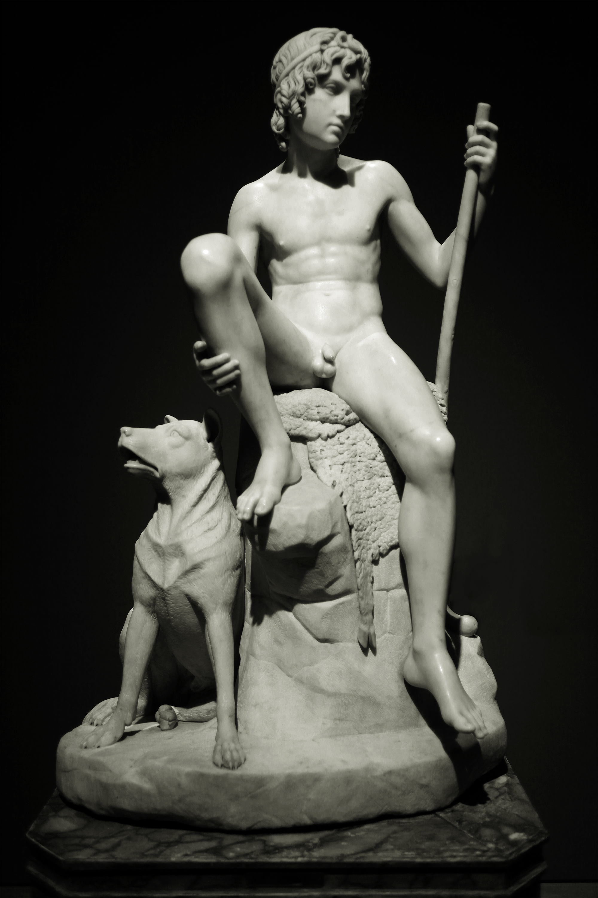 Bertel Thorwaldsen (1770-1844) Pastorello (1823-1826). Manchester Art Gallery, donazione di Mrs Dorothy Una Phillps. Fotografata alla mostra "Canova-Thorwaldsen" presso le Galleria di Italia di Milano.